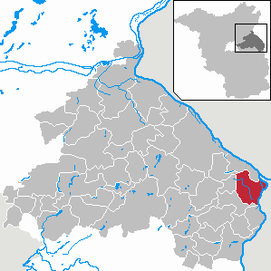 Küstriner Vorland in Brandenburg (Country) - District Märkisch-Oderland